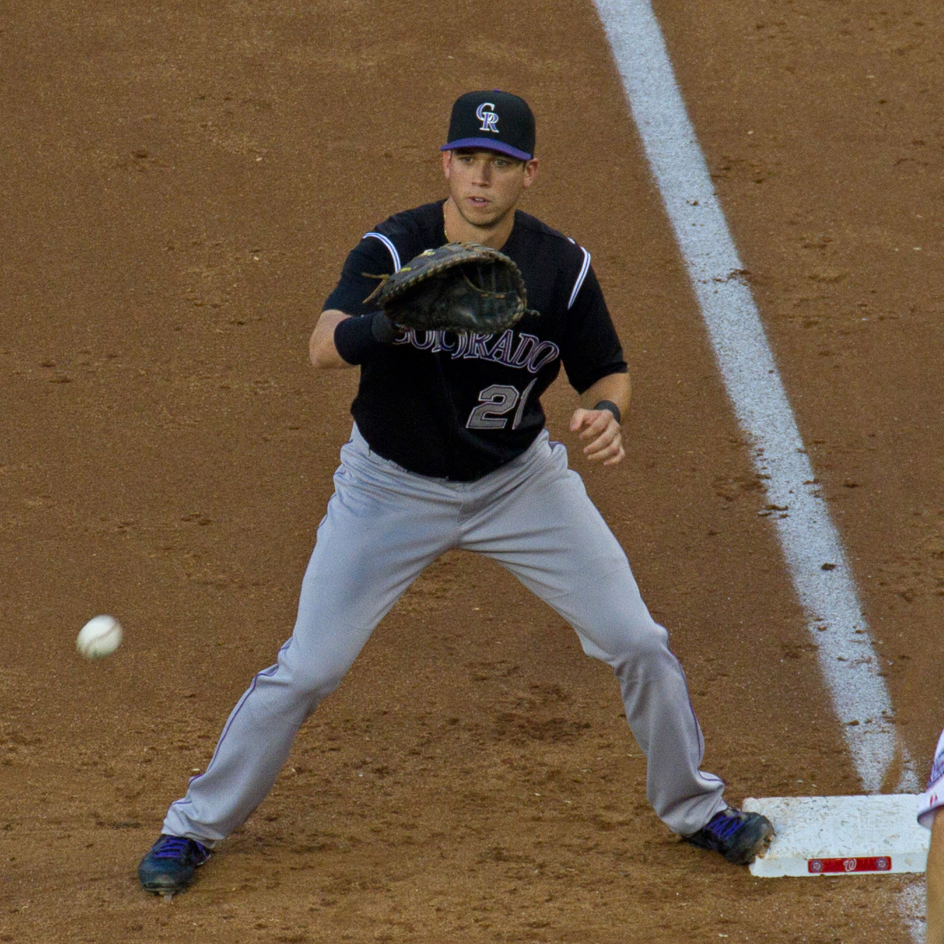 Tyler Colvin